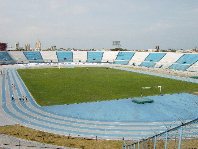 Estadio Modelo. Federación Deportiva del Guayas. Guayaquil Ecuador. Aug 17, 2005.